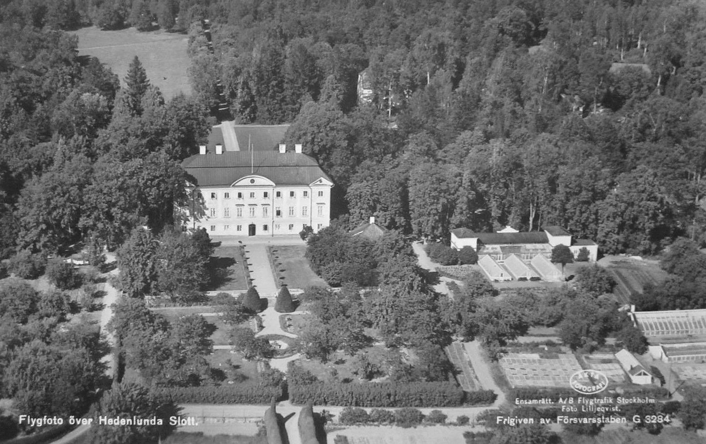 Hedenlunda slott från luften